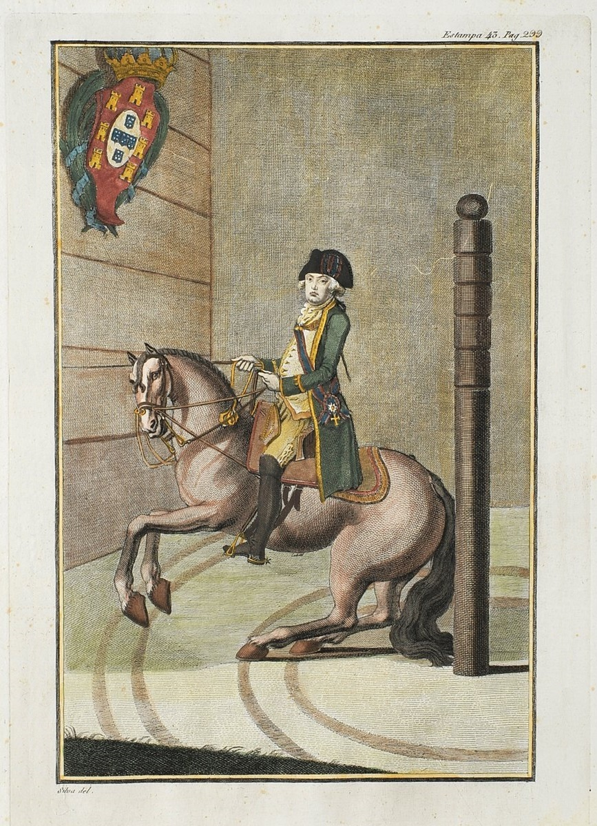 Luz da Liberal e Nobre Arte da Cavallaria, Estampa XLIII, p. 299 (1790)